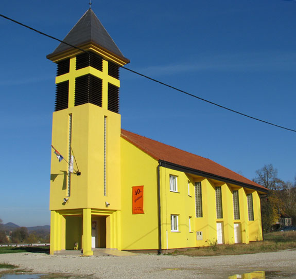 Crkva u Budinščini, Krapinsko-zagorska županija